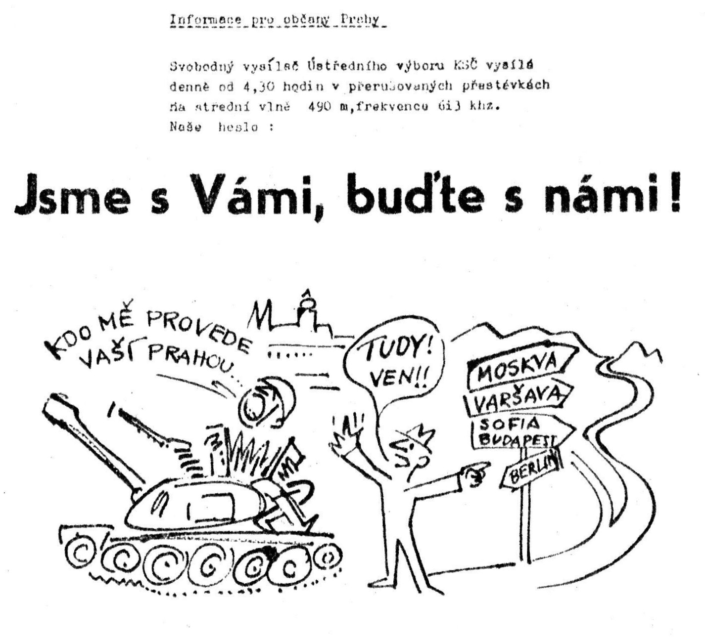 Leták pro obyvatele Prahy a okolí, vydaný polooficiálními úředními strukturami.